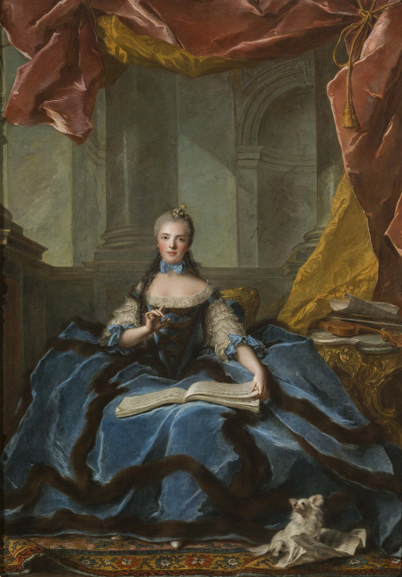 Caption from the museum Commandé pour Madame Infante ; pendant du MV 3800 ; visage, repris du MV 3801, réalisé dans un premier temps, payée en 1760 ; portrait livré à la cour, 3 octobre 1758 ; salon de 1759, n°13 ; collection Louis XV ; cité au cabinet de la Surintendance de Versailles ; 1759-1784 ; transporté à Paris au Museum central des arts, placé dans les réserves, 13 juin 1797 ; retour à Versailles à une date indéterminée ; déplacé du Grand Trianon au Petit Trianon, 1823 ; signalé par Lauzun, dans l'antichambre du Petit Trianon, 29 juin 1829 ; envoyé en restauration, 13 mars 1964 ; de nouveau en restauration, 1965 ; exposé dans la Galerie Basse ( salle n°51 ), rez-de-chaussée, corps central, juillet 1965; envoyé en restauration, 1966 ; de nouveau en restauration, 1969 ; exposé dans la Galerie Basse ( salle n°51 ), rez-de-chaussée, corps central, 1970 ; déposé à l'ambassade de France à Washington, 30 mars 1976 ; retour à Versailles, 30 juin 1976 ; exposé dans la chambre de Madame Victoire ( salle n°55 ), appartement de Mesdames, rez-de-chaussée, corps central, 1988 ; envoyé en restauration, rentoilage, 1998-1999.